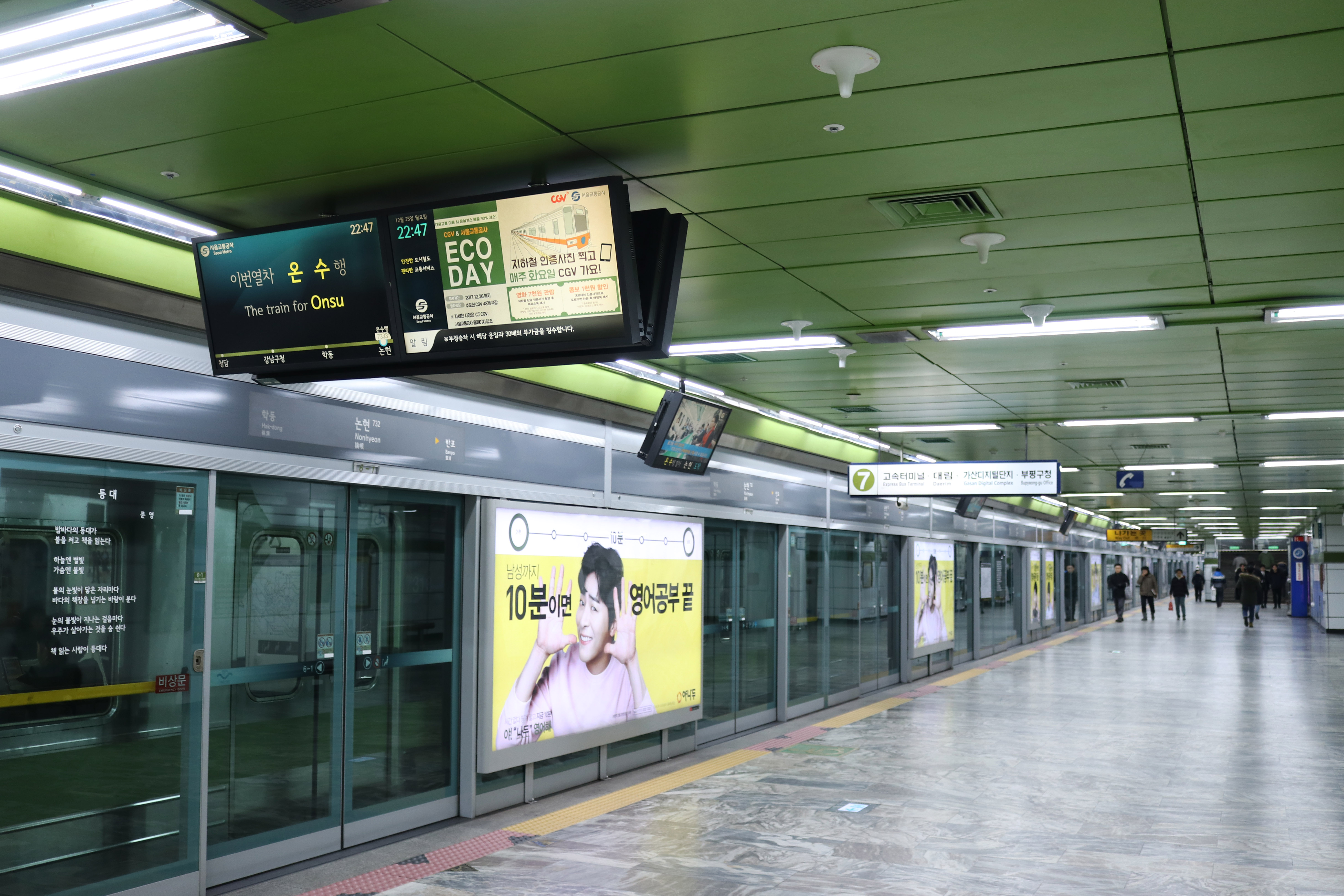 논현역 승강장